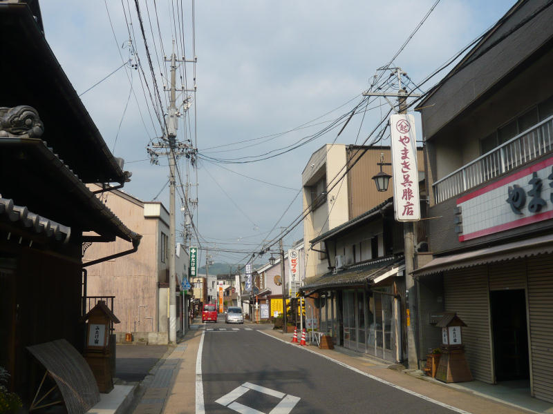 旧御嶽宿中心部。中央の道路は旧中山道である